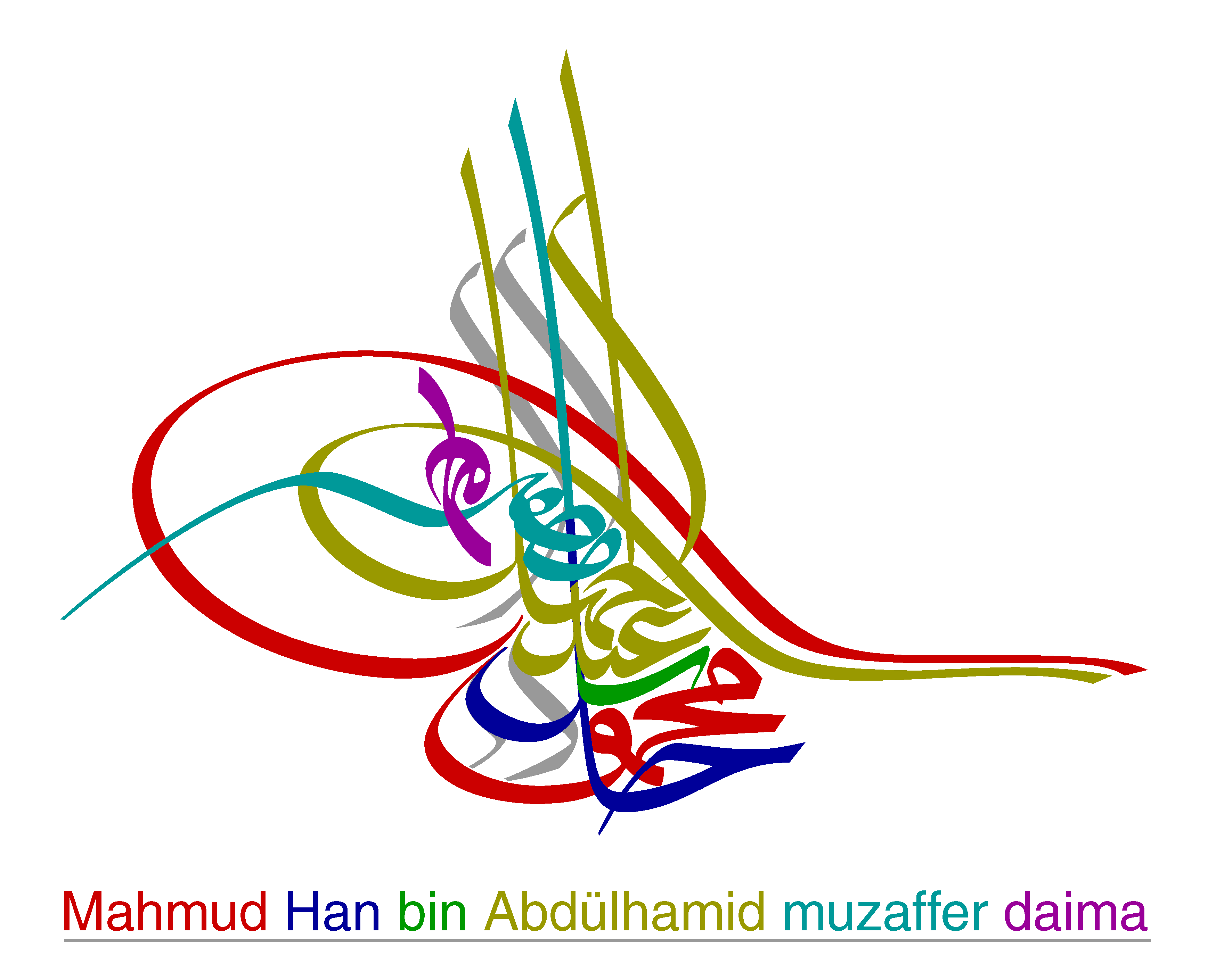 Sultan Mahmud II's tughra